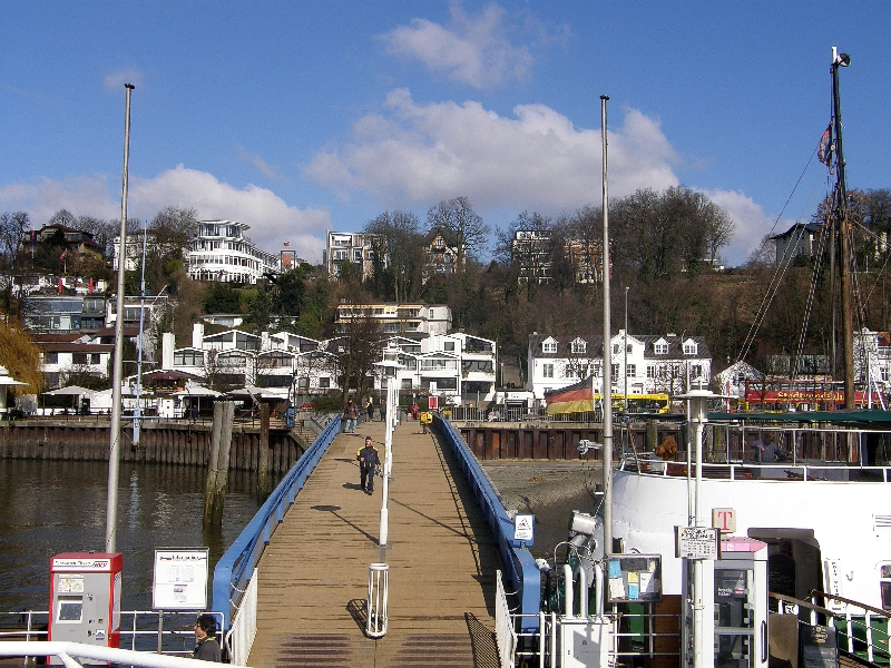 Bilder aus Hamburg. Anleger Neumühlen - Övelgönne/Museumshafen am Nordufer der Elbe; Stadtteil Hamburg-Othmarschen. Am oberen Hangabschluss verläuft die Elbchaussee hinter den Gebäuden parallel zur Elbe. Das dritte Gebäude von links im maritimen Stil mit dem oberen Rotundenabschluss beherbergt die Hamburger Zentrale des international tätigen Architekturbüros Gerkan, Marg und Partner (gmp)